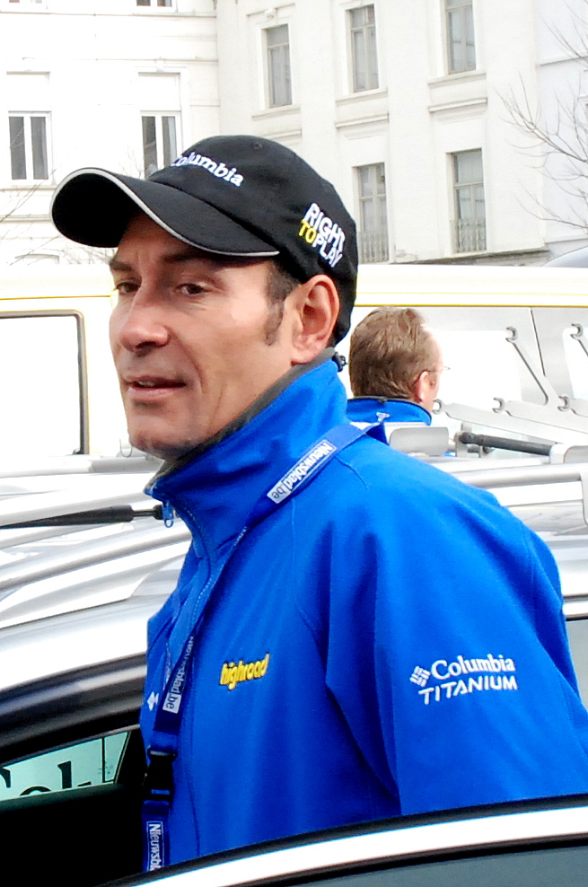 Erik Zabel in Gent